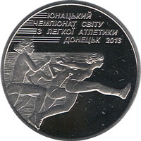 Юнацький чемпіонат світу з легкої атлетики реверс: Юнацький чемпіонат світу з легкої атлетики реверс